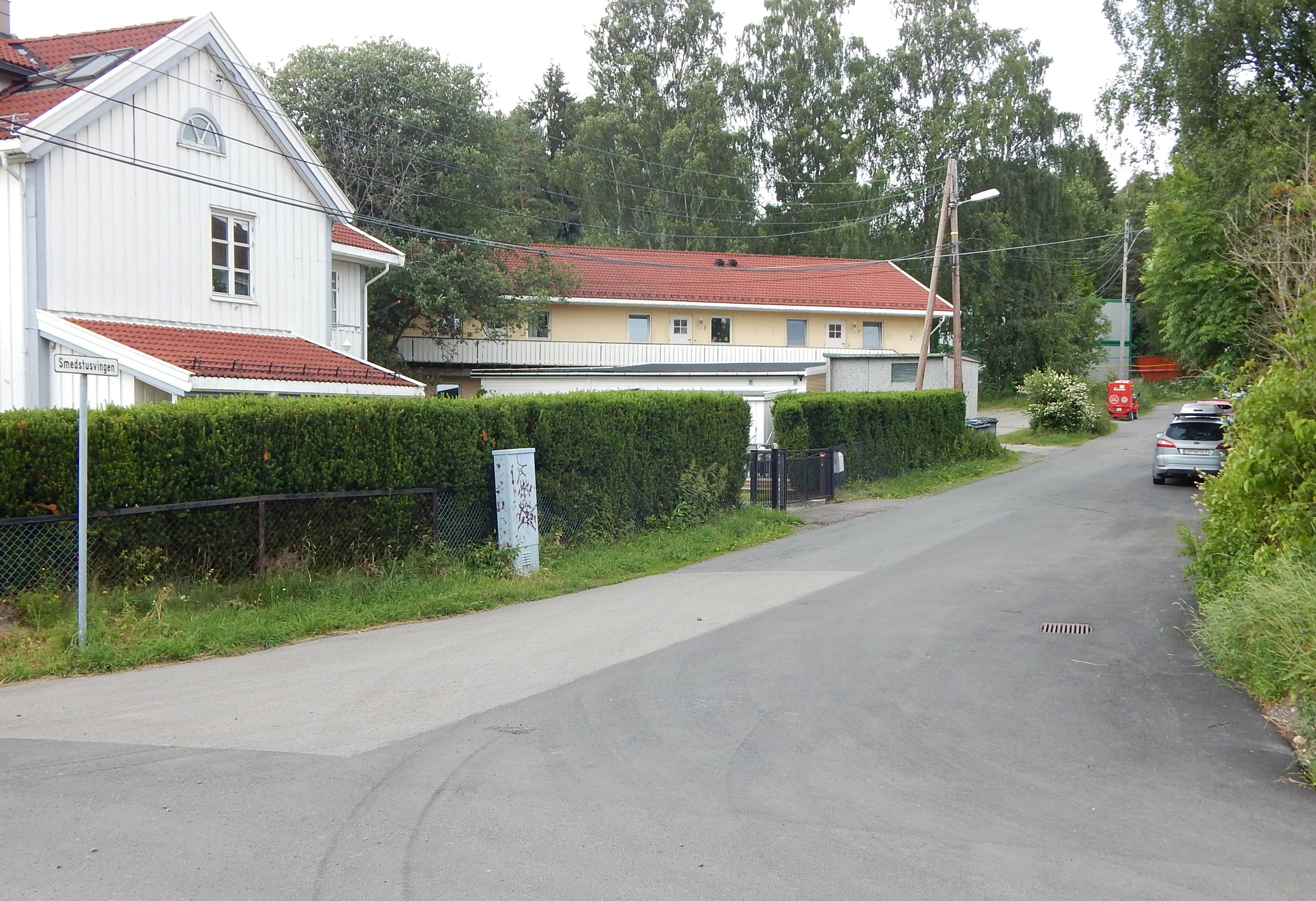 Smedstusvingen sett fra Erlandstuveien